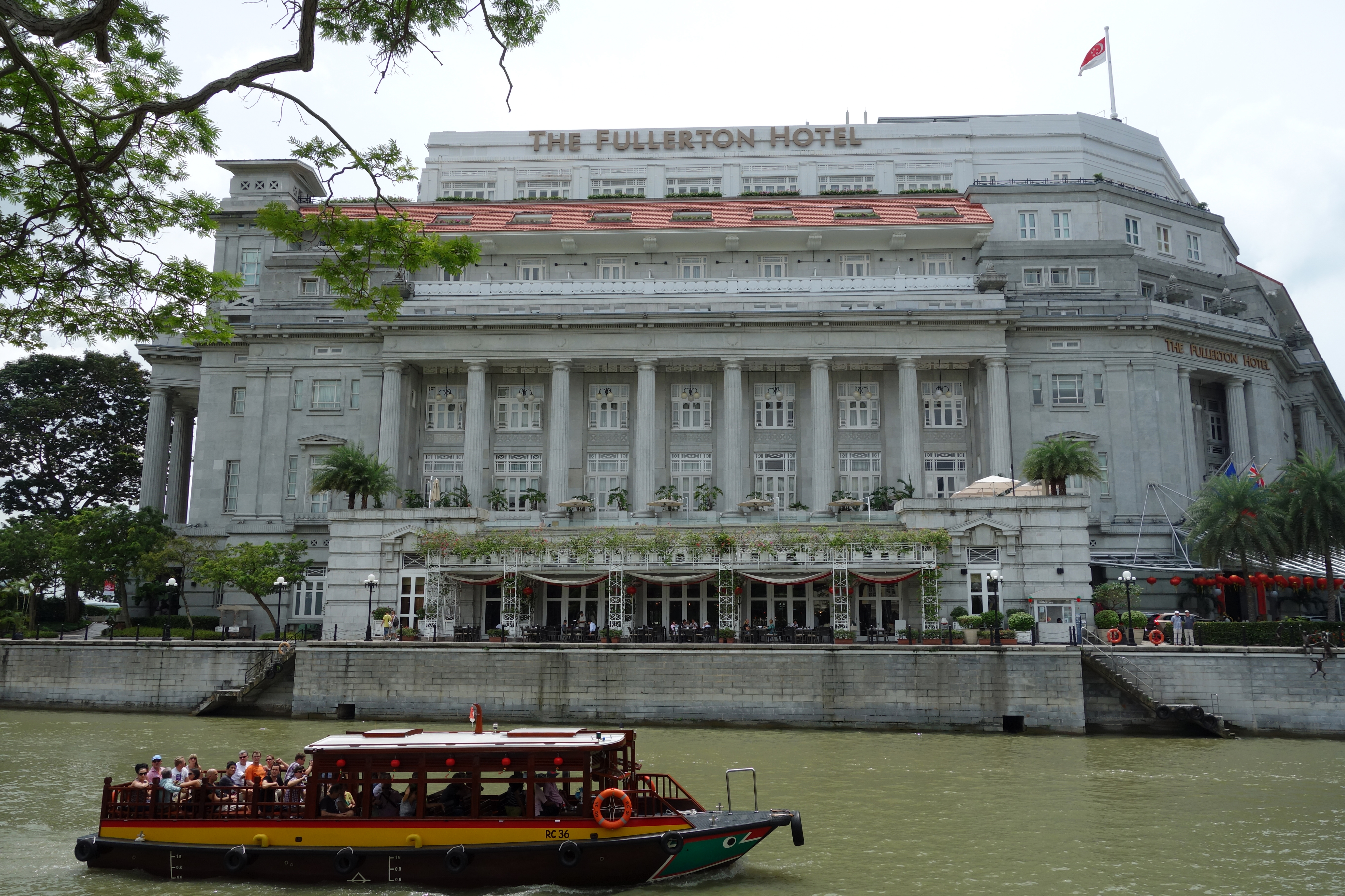 The Fullerton Hotel Singapore